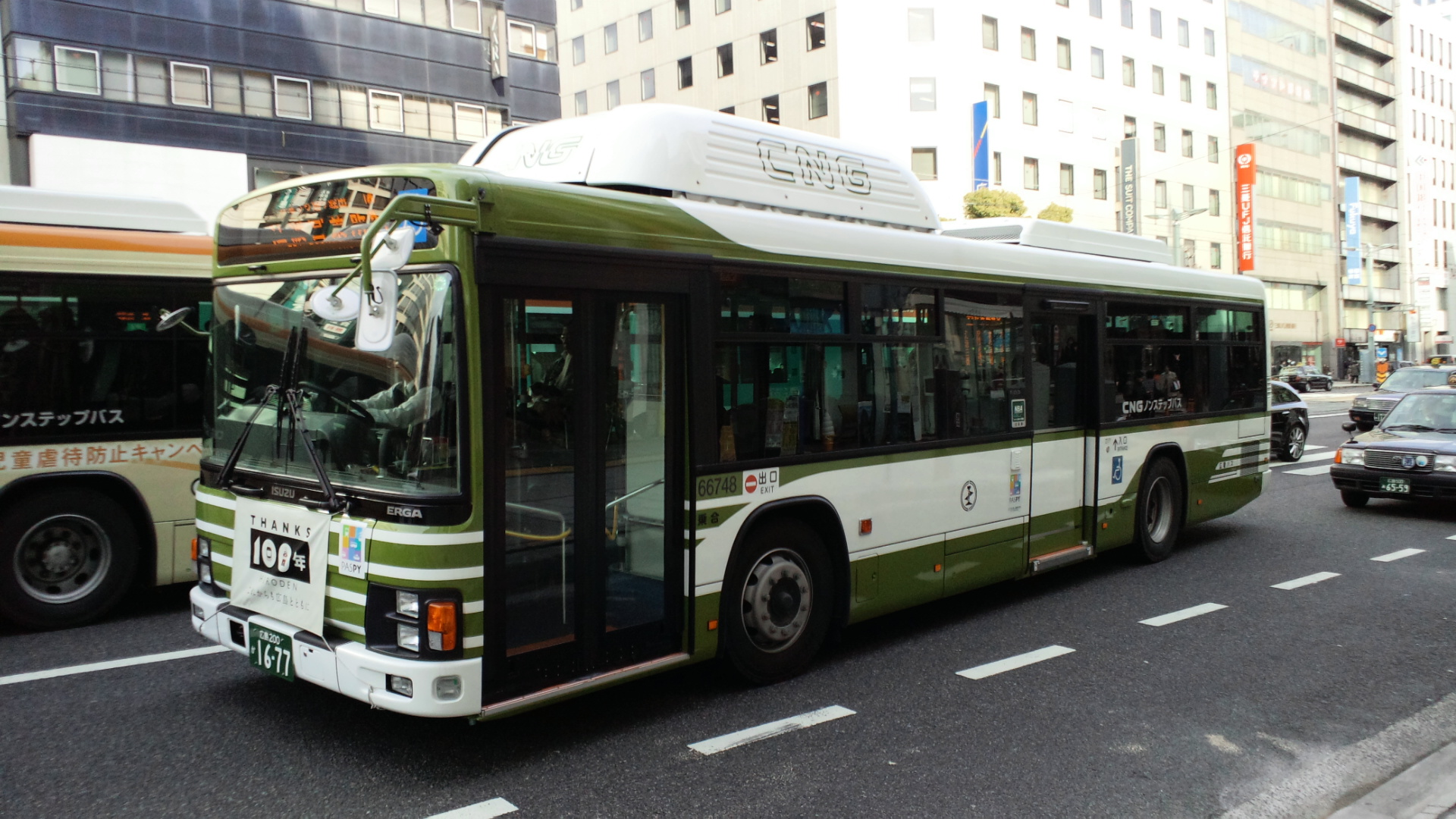 LDG-LV234L3改